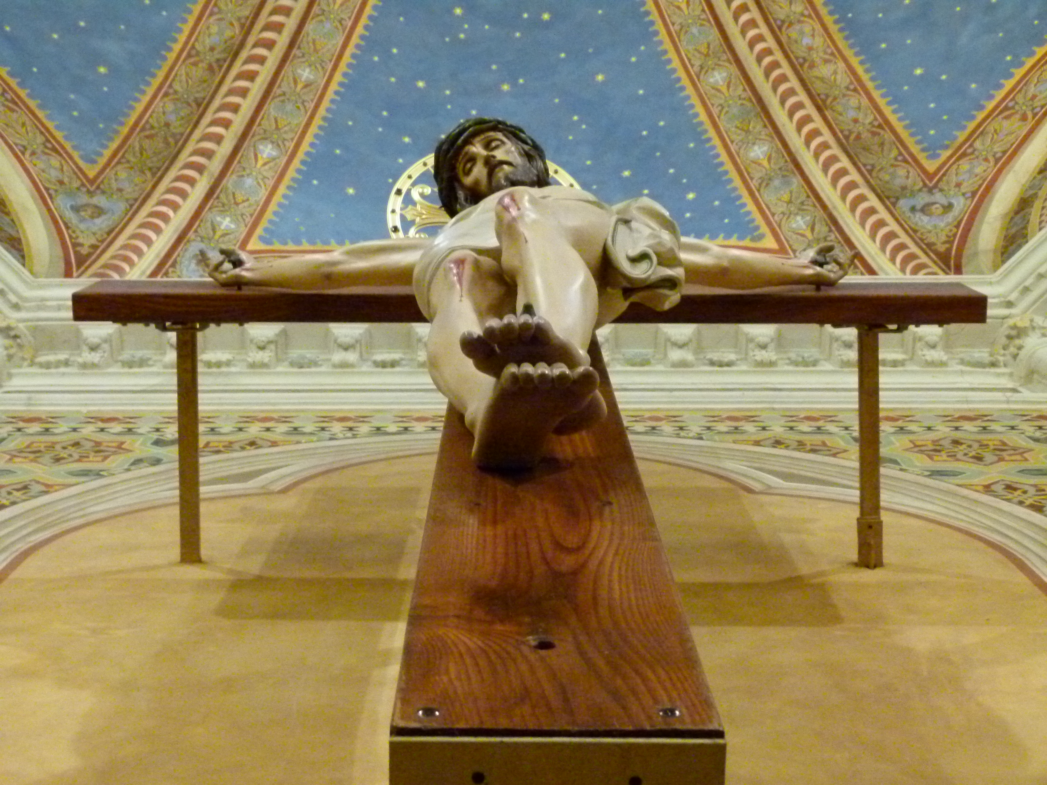 This photo was taken with Panasonic Lumix DMC-FZ100 camera, thanks to Panasonic. You can see all photographs in category: Taken with Panasonic Lumix DMC-FZ100.